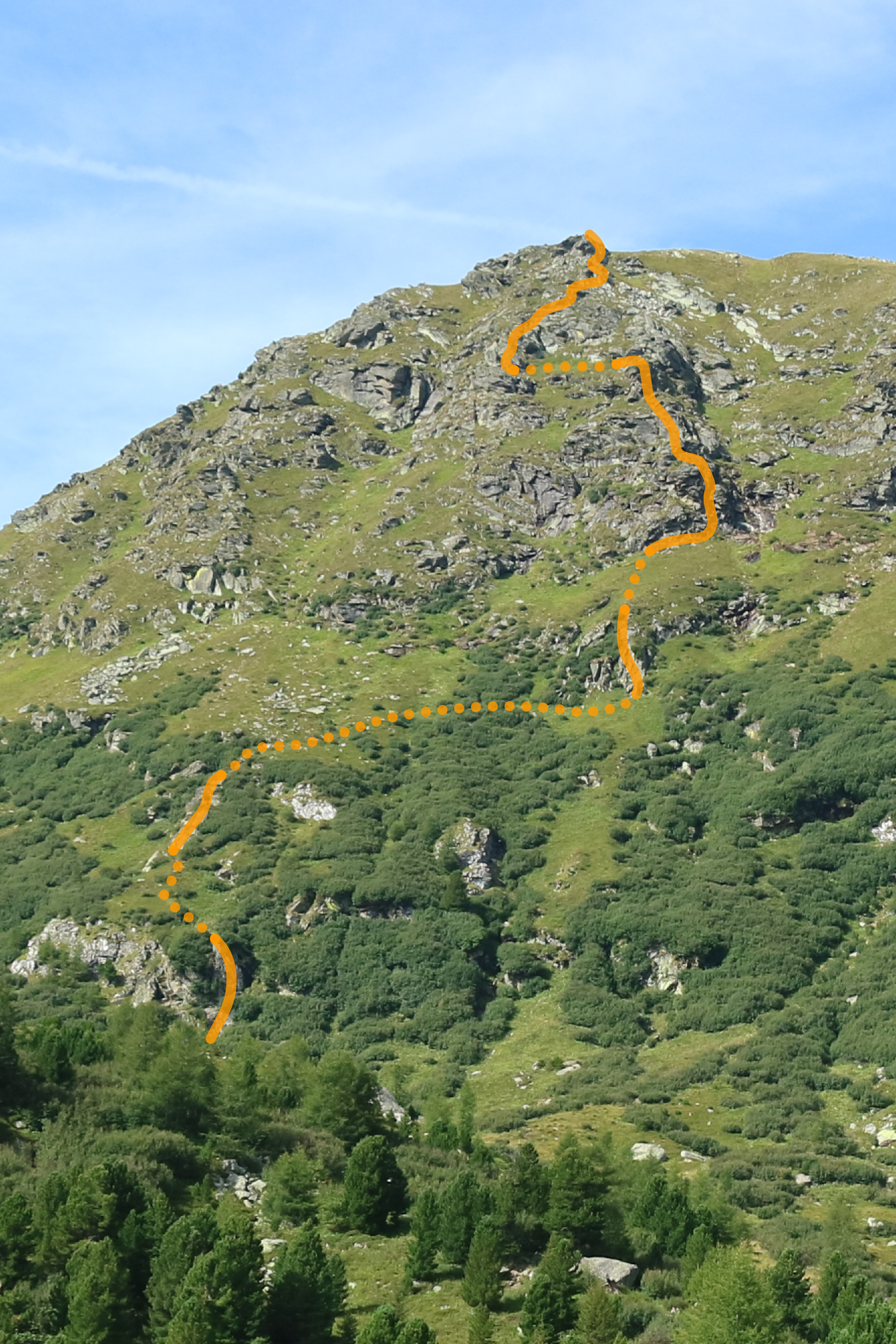 Verlauf des Lukas-Max-Klettersteigs durch die Ostflanke des Kreiskogels in den Seetaler Alpen, Steiermark